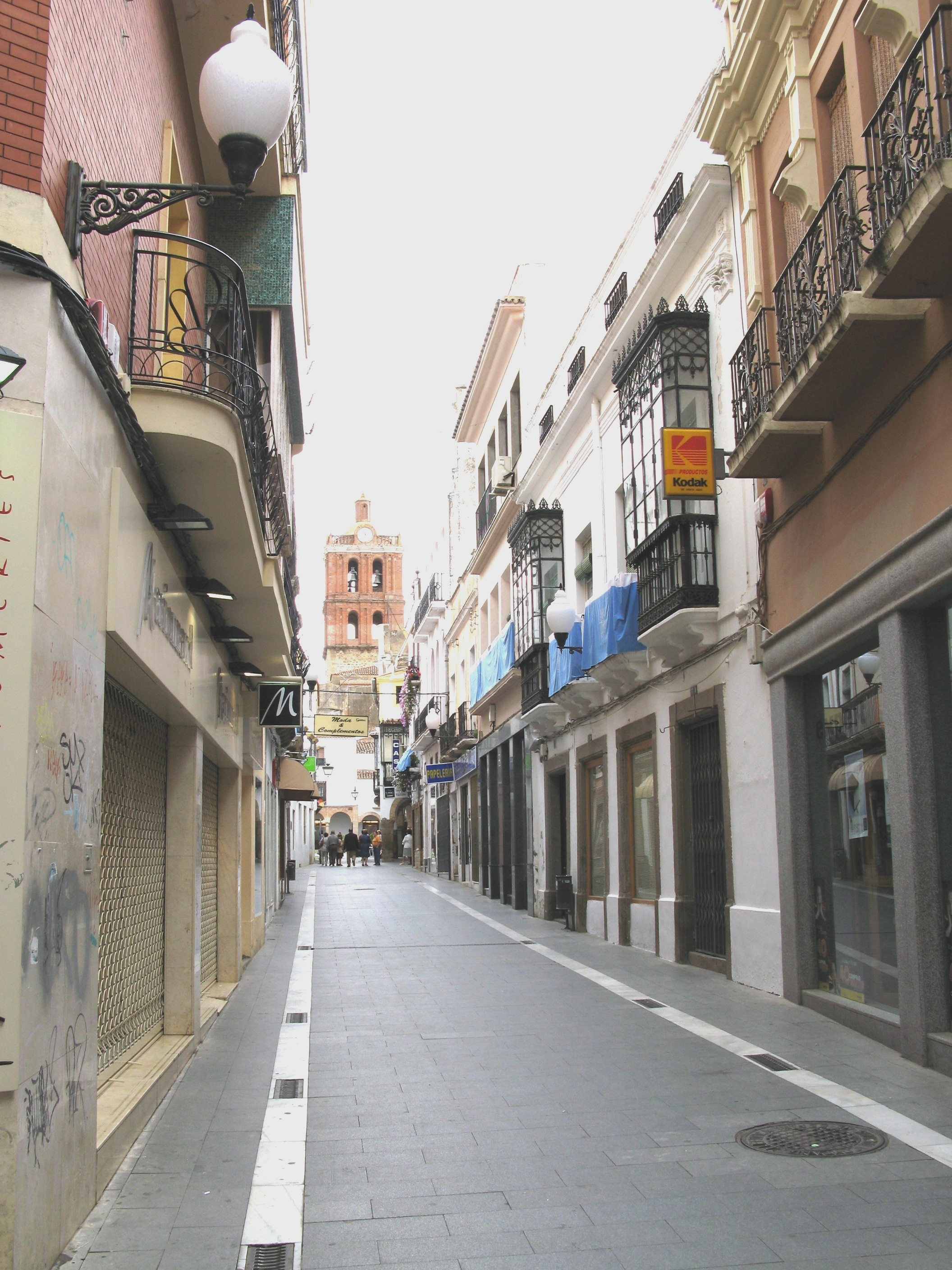 Calle Sevilla de Zafra en la actualidad